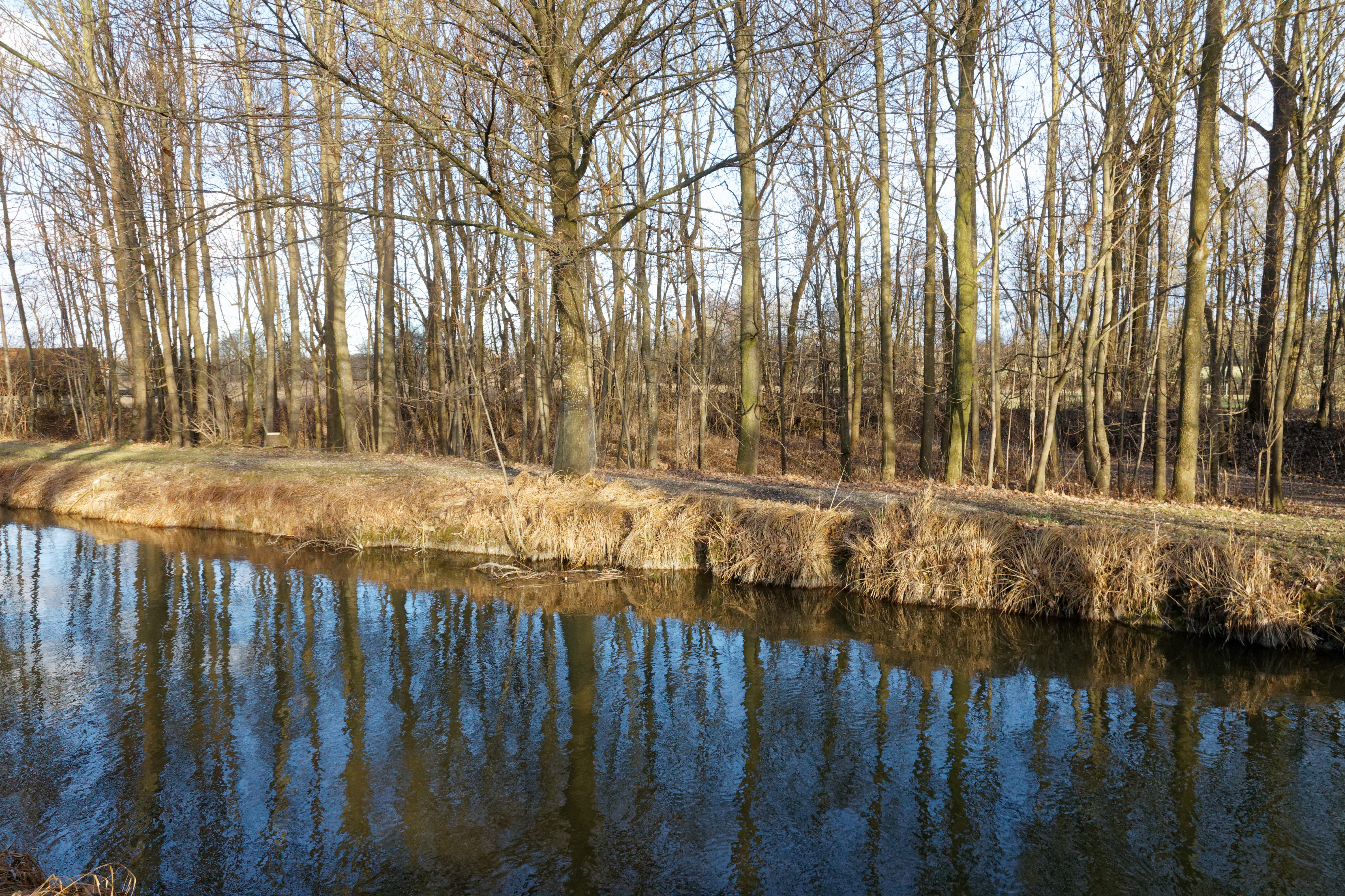 Schleißheimer Kanal mit ehemaligem Hafenbecken des Garchinger Hafens